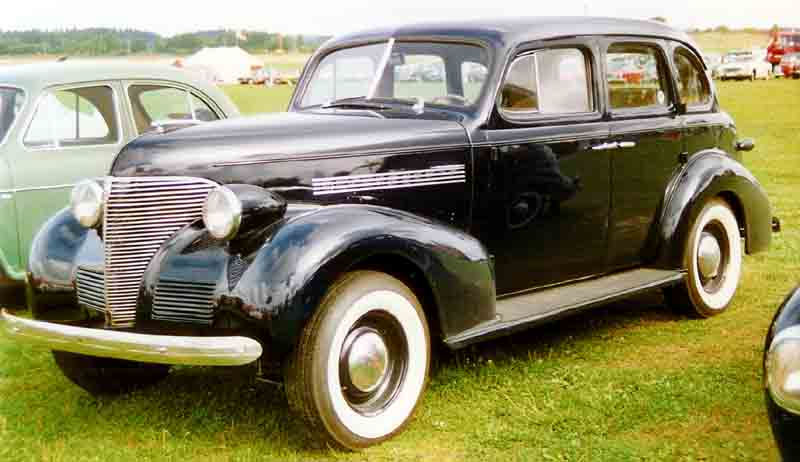 1939 Chevrolet Master 85 4-Door Sedan 1939